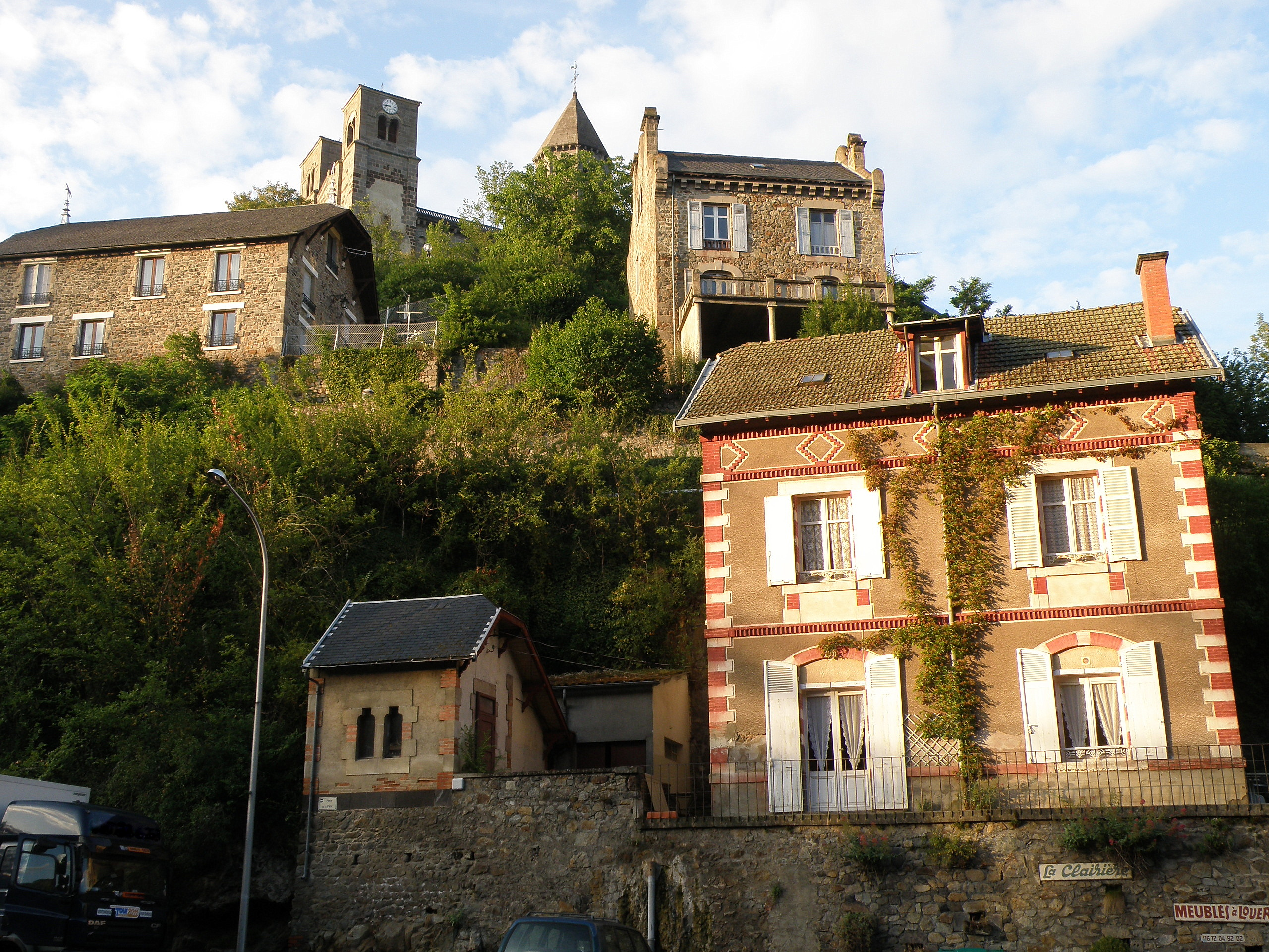 Saint-Nectaire, comm. du Puy-de-Dôme (France, région Auvergne). Vue du mont Cornadore, depuis Saint-Nectaire-le-Bas. Au sommet de la butte : église Notre-Dame-du-Mont-Cornadore. En haut à droite : presbytère.